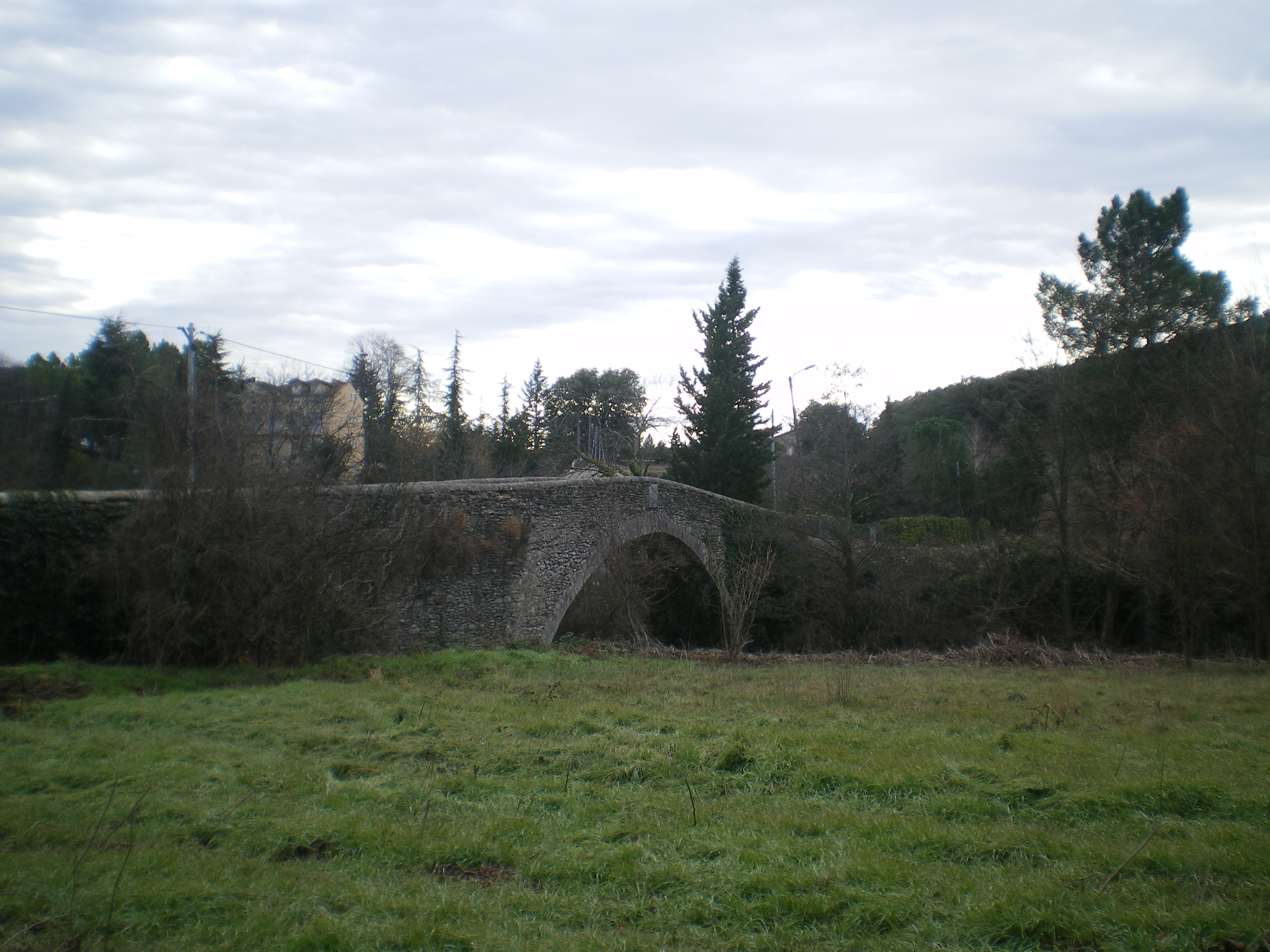 Pont de Bertrand, médiéval, Branoux (France)